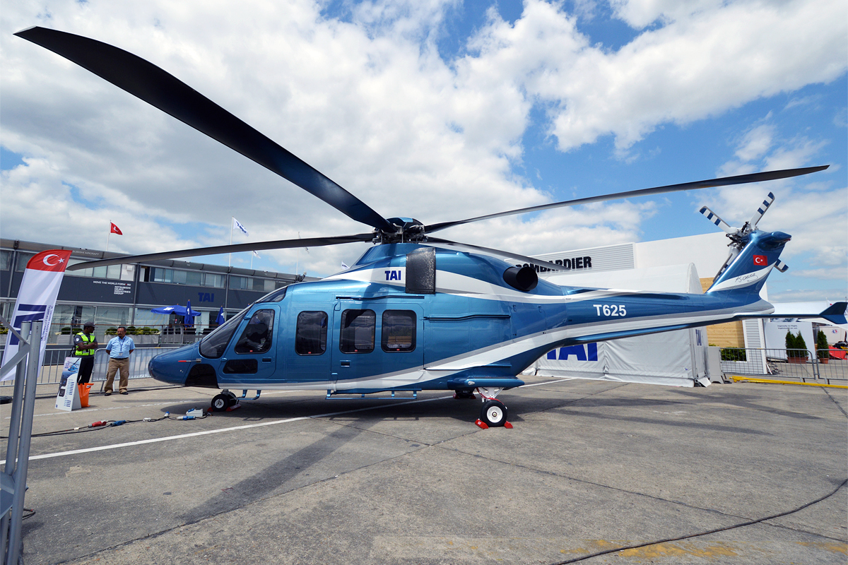 TAI, T625